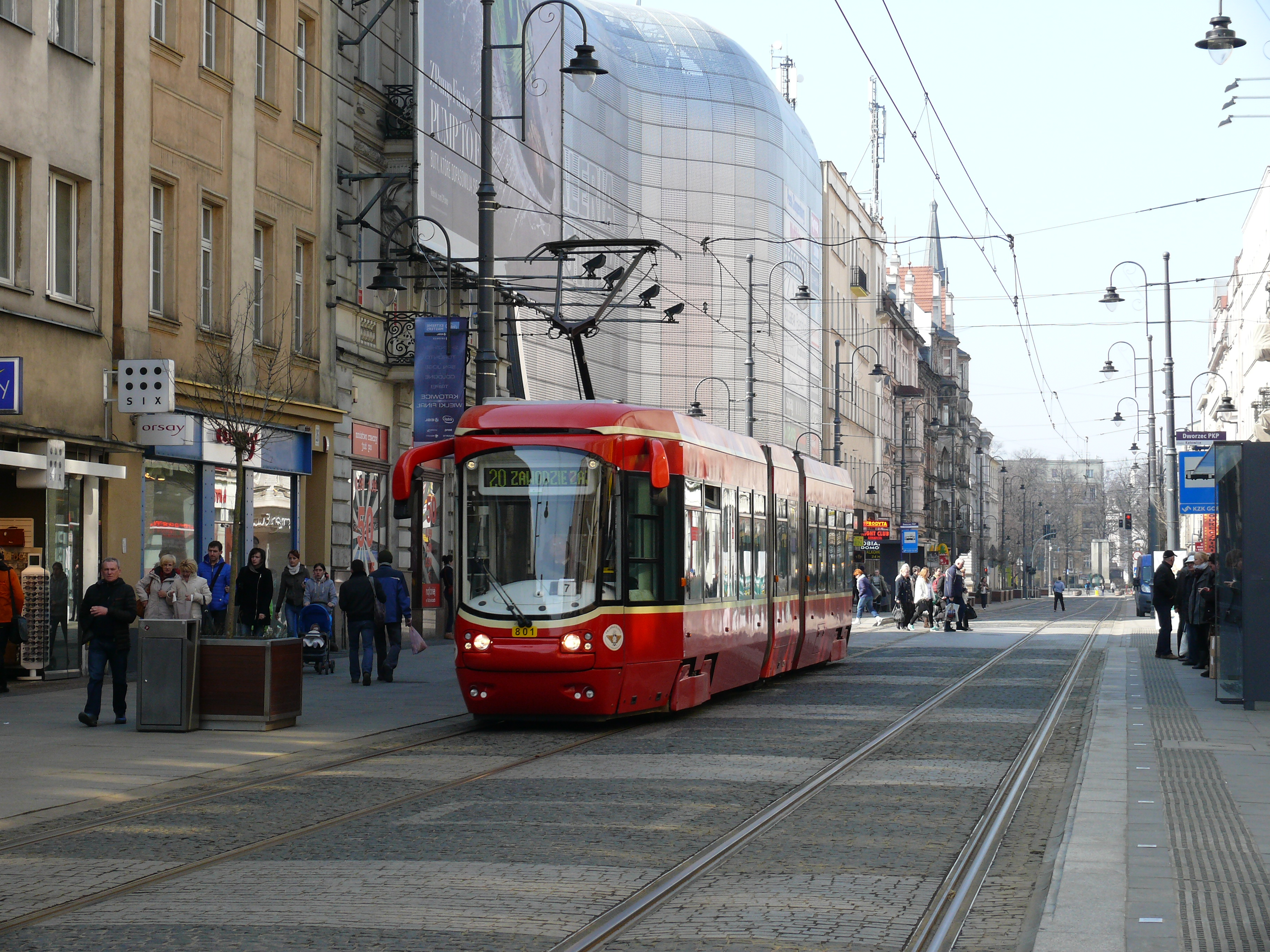 Straßenbahn vom Typ Konstal 116Nd, genannt "Karlik", auf der Ulica 3.Maja in Kattowitz.